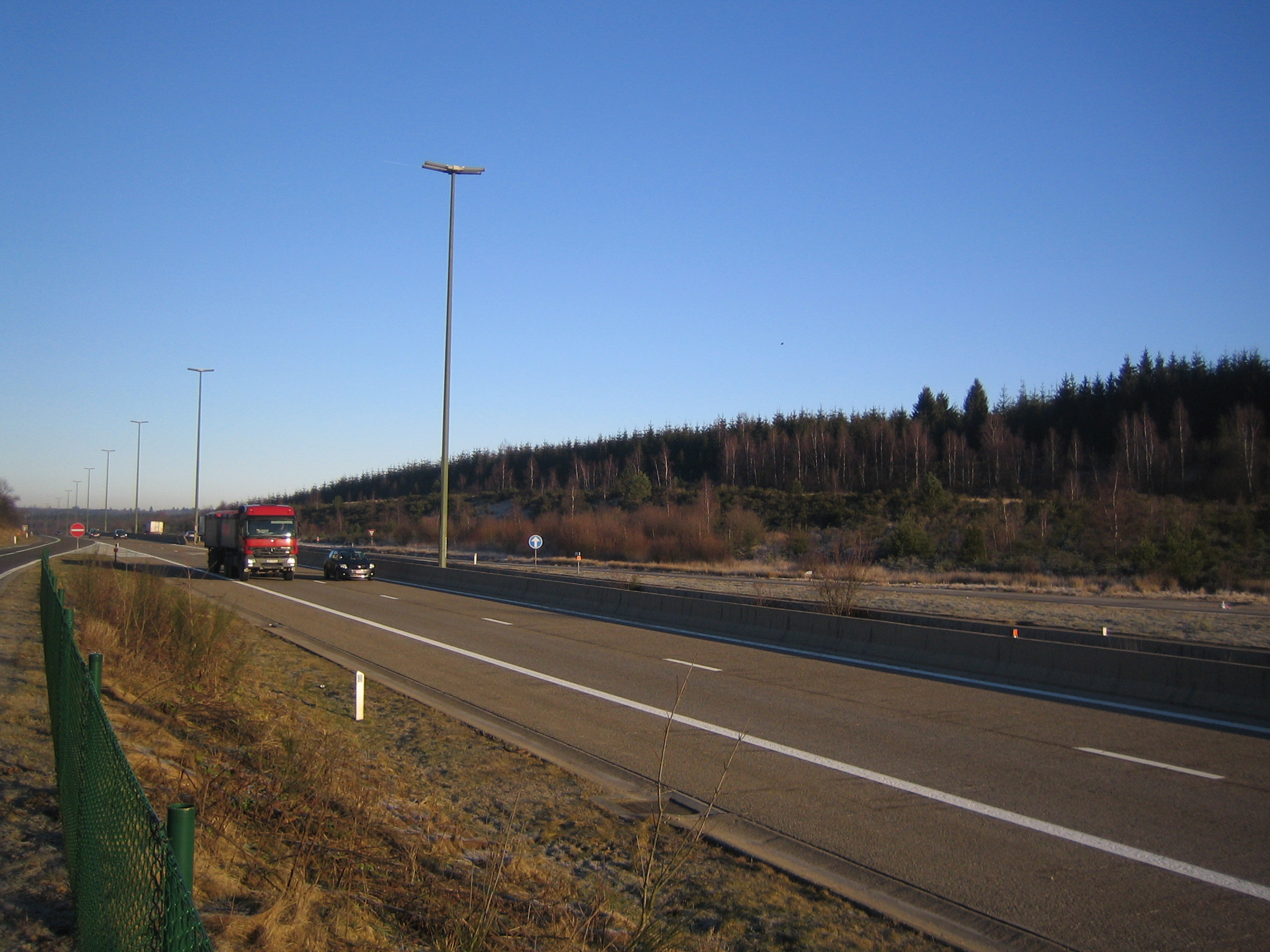 A 27 in Belgium near Sankt Vith